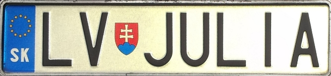 Wunschkennzeichen Slowakei